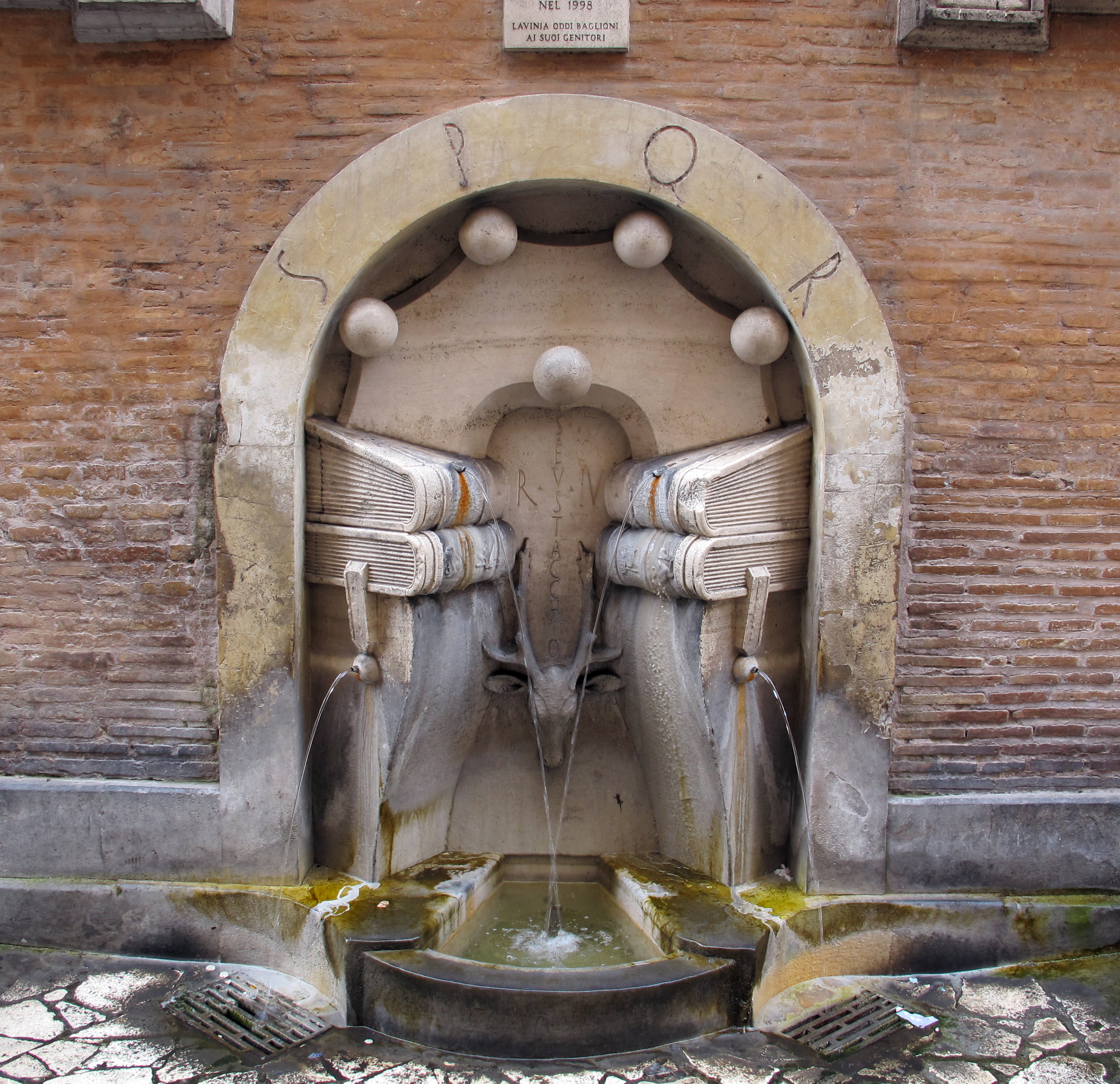 La sapienza, fontana di sant'esustachio